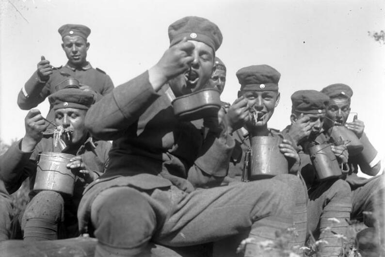 Die ersten grossen diesjährigen Herbstmanöver der Reichswehr in Ostpreussen ! "Essenfassen" unserer Reichswehr-Soldaten im Manövergelände.